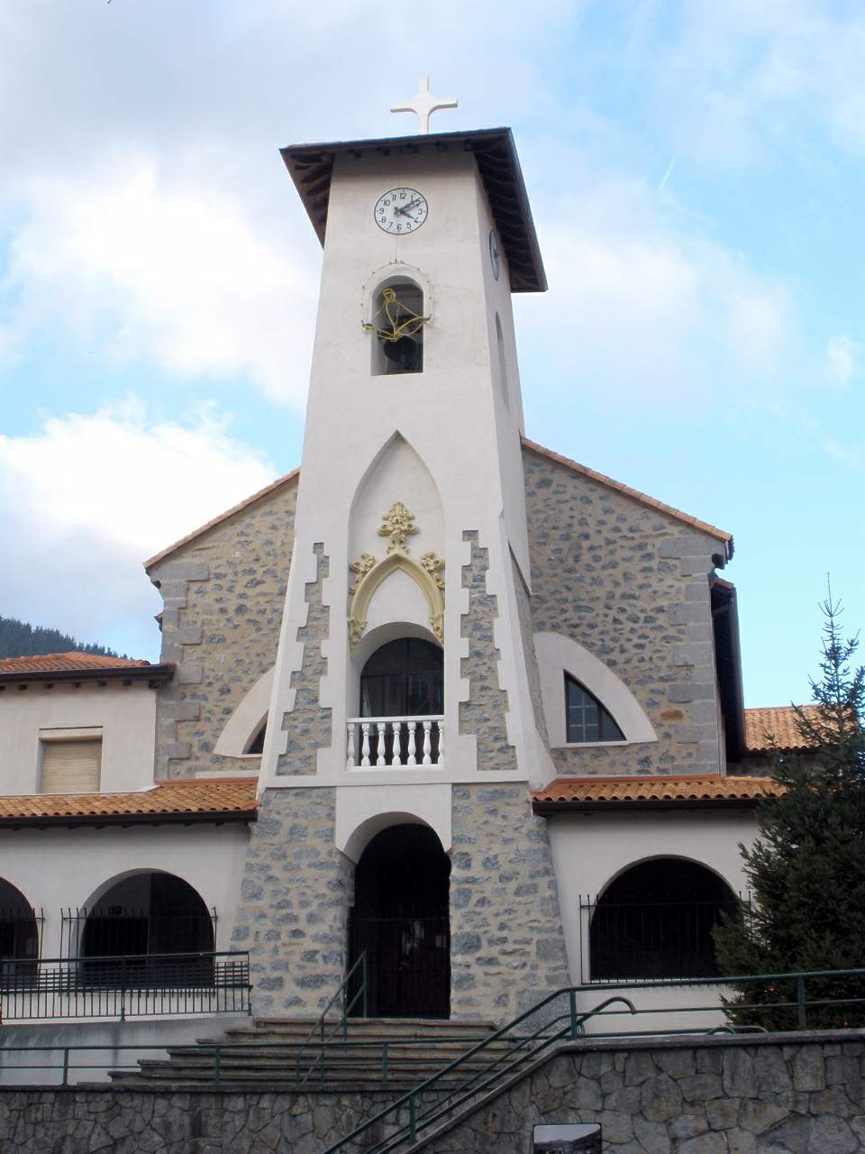 iglesia de Santa Ana, en el barrio de Areta de Laudio/Llodio (Álava)